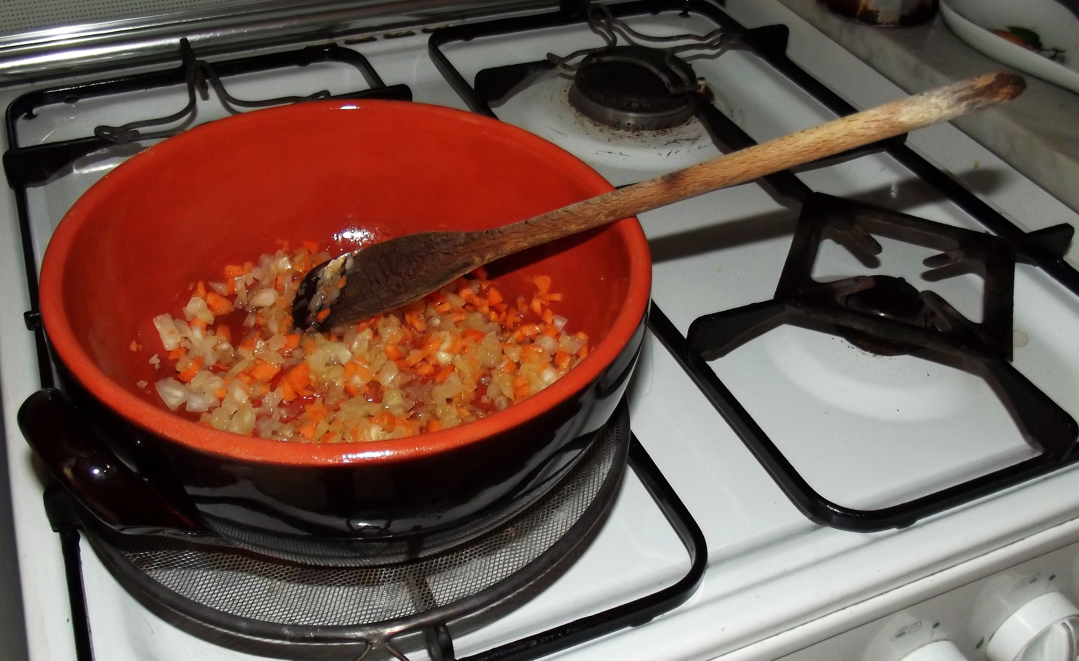 Soffritto in fase di cottura